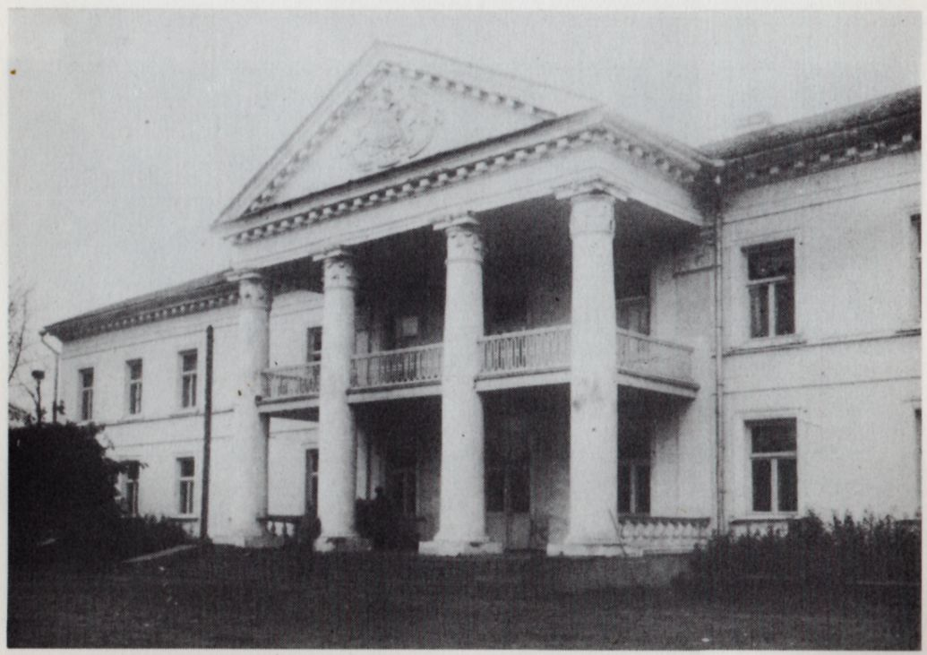 Беларуская (тарашкевіца): Дукора (Dukora), сядзіба Ашторпаў (Aštorp) і Гартынгаў (Harting)